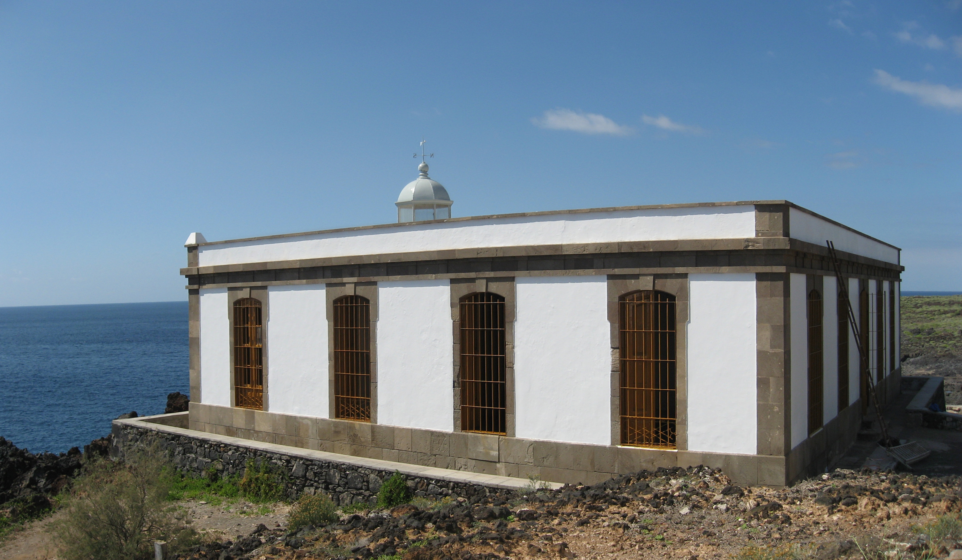 Faro. Malpaís de Rasca